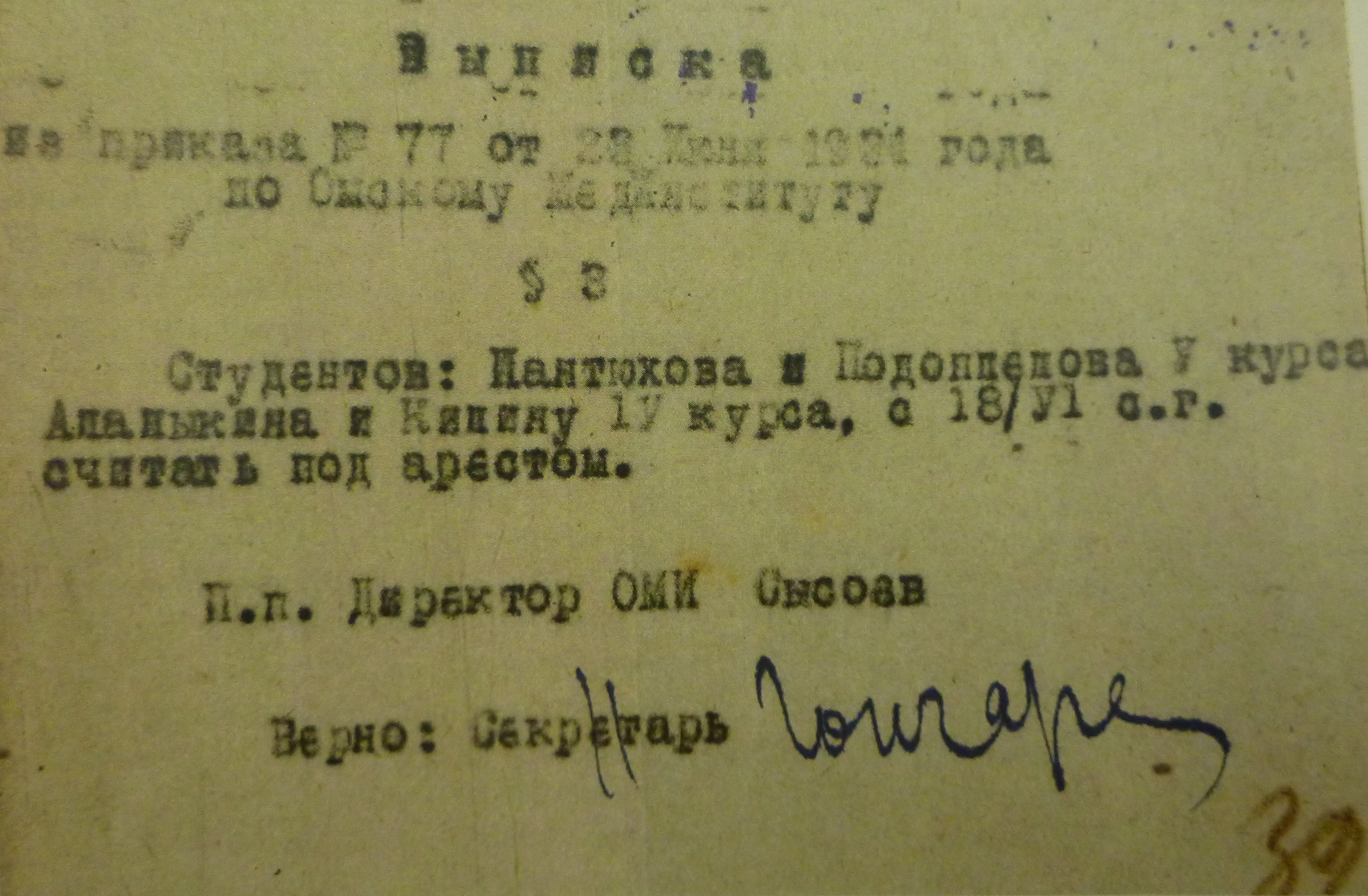 Выписка из Приказа по Омскому медицинскому институту от 23 июня 1934 года об аресте четырех студентов